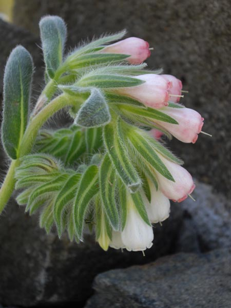 Onosma alborosea